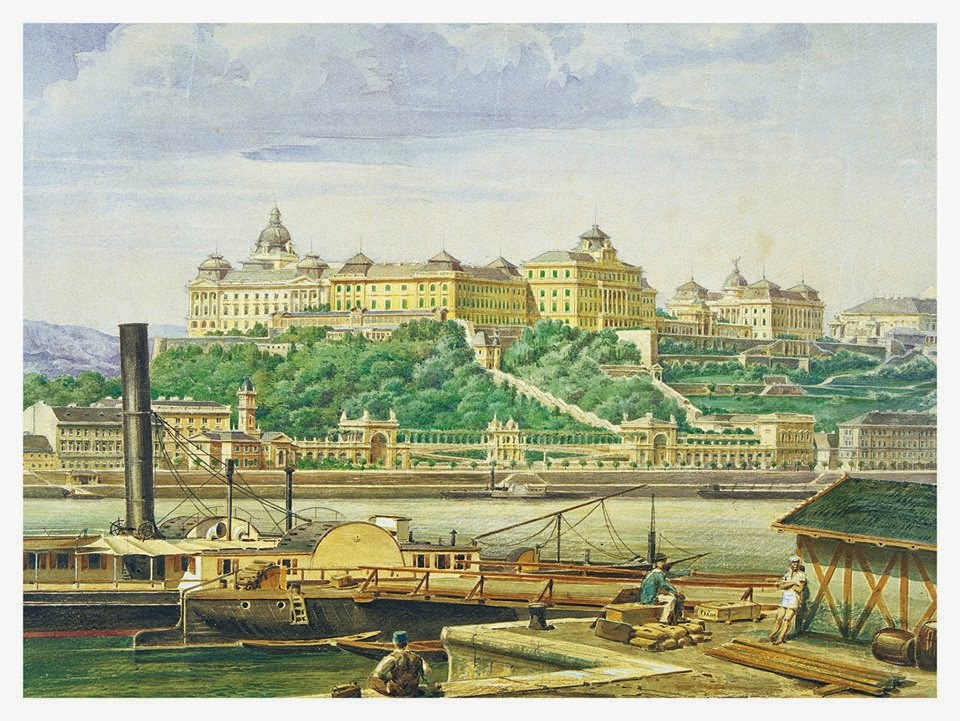 A Budai vár a 19. század végén